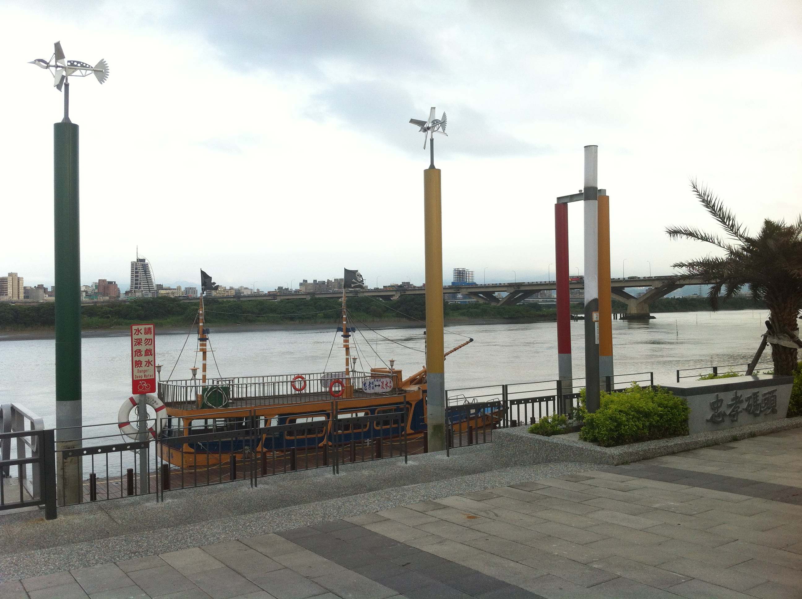 忠孝碼頭。